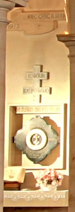 Basilique de Notre-Dame de Sion, autel de commémoration et de réconciliation